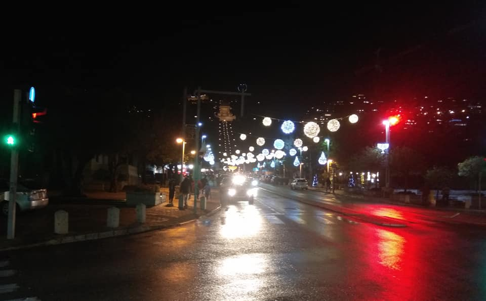 המושבה הגרמנית חיפה, 2018